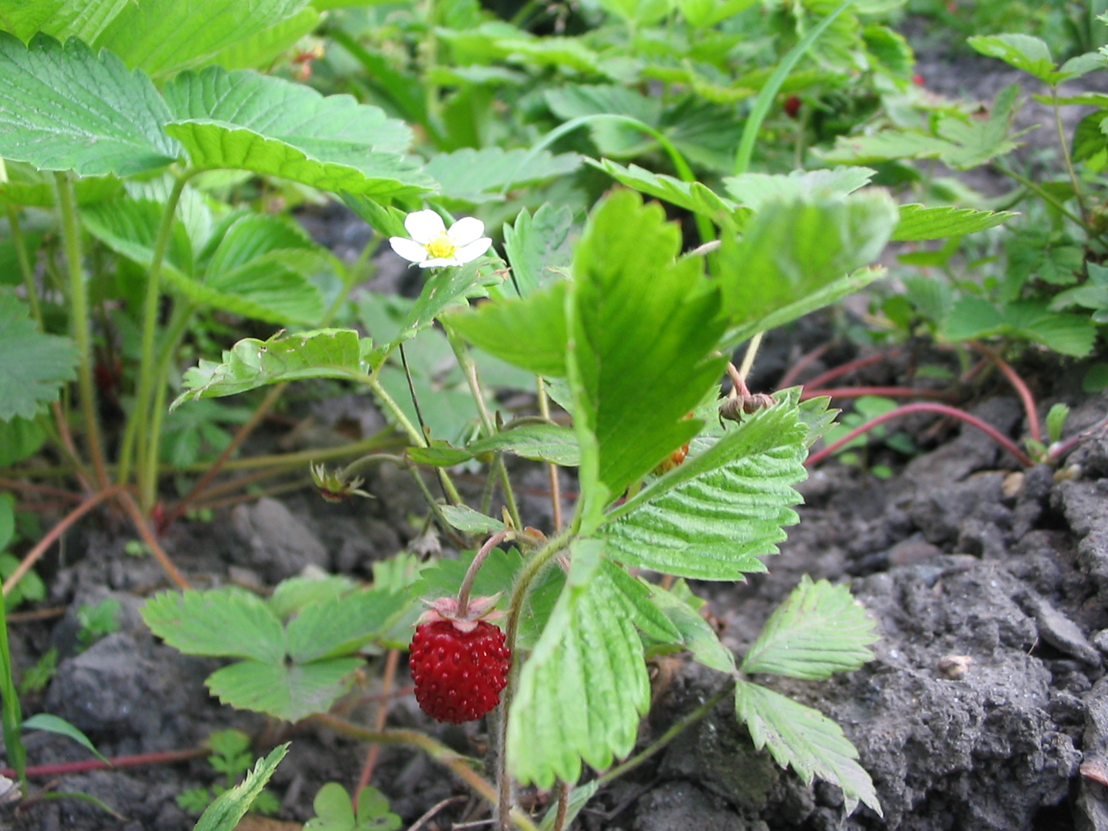 суниця садова